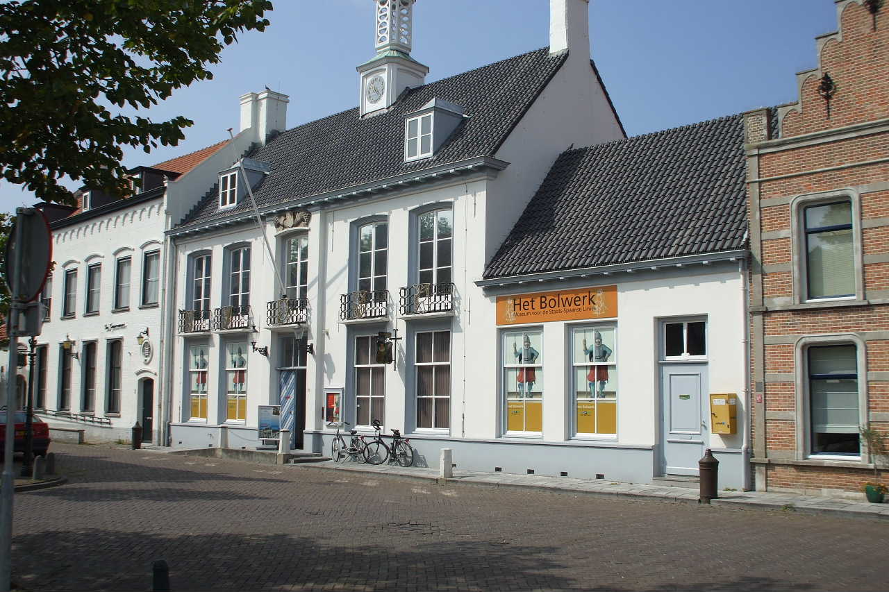 Voormalig streekmuseum. Nu museum Het Bolwerk, museum voor de Staats Spaanse Linies